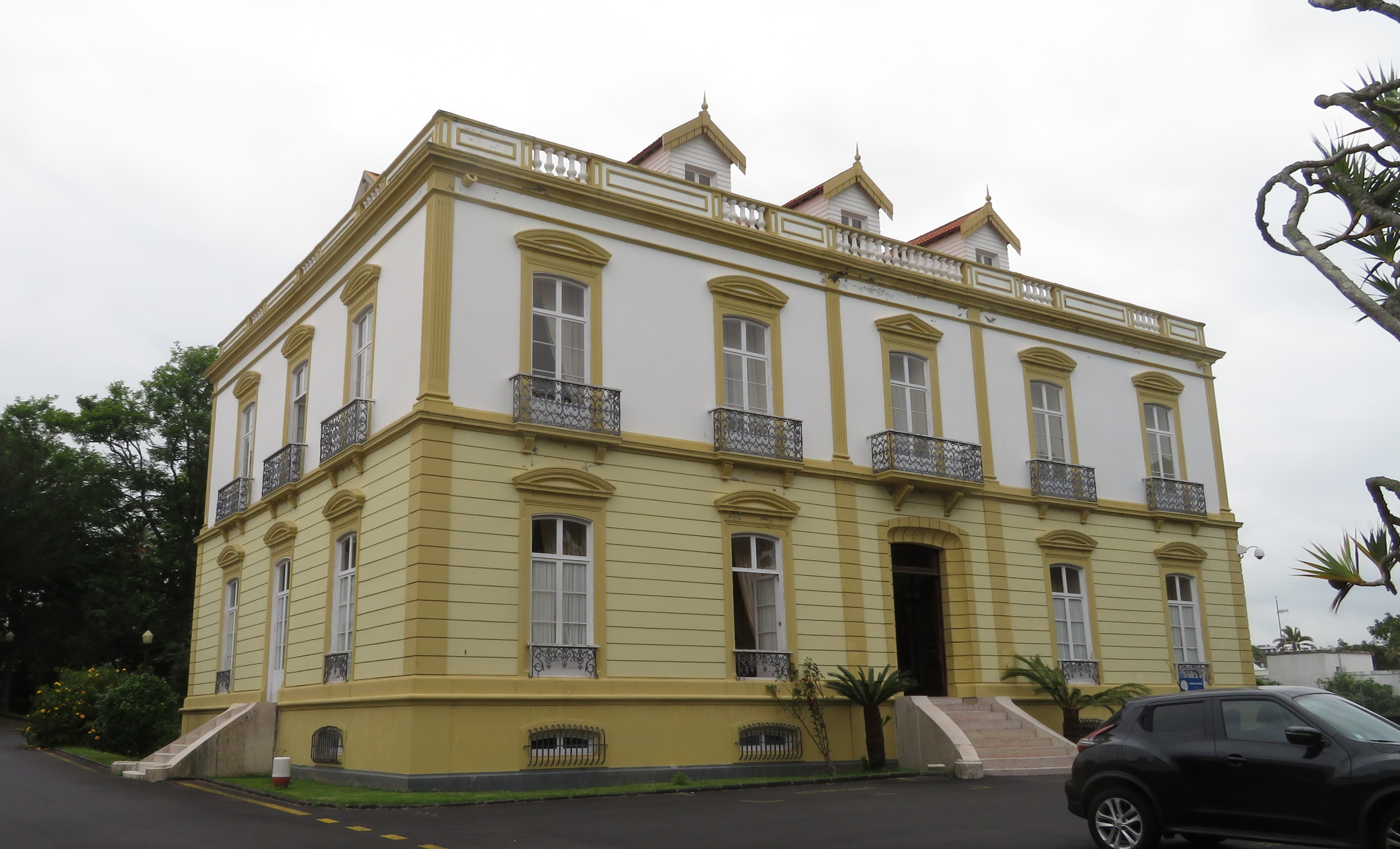 Reitoria, Universidade dos Açores, Ponta Delgada, Portugal